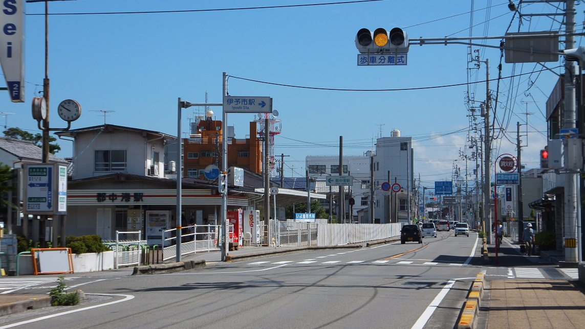 愛媛県伊予市 予讃線伊予市駅前